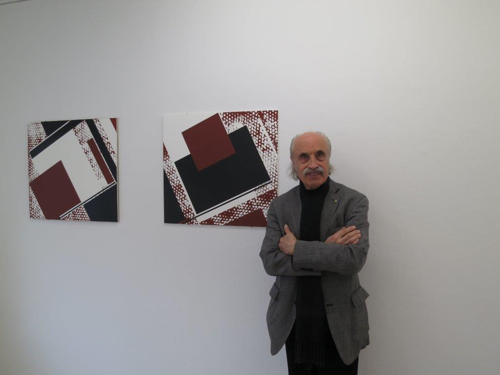 Joachim Lothar Gartner in der Ausstellung / Gartner & Gartner / An diesem Ort / Holbein Haus Augsburg 2015